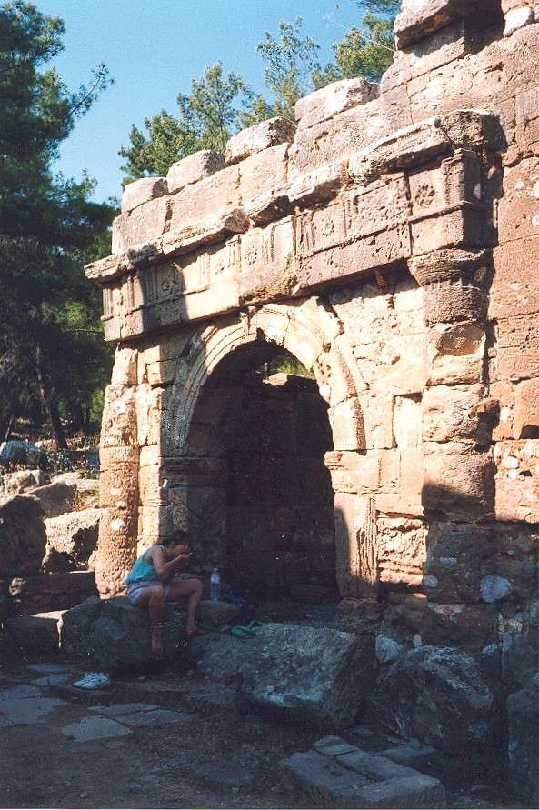 Seleukia (Pamphylien) - Agora, Tordurchgang